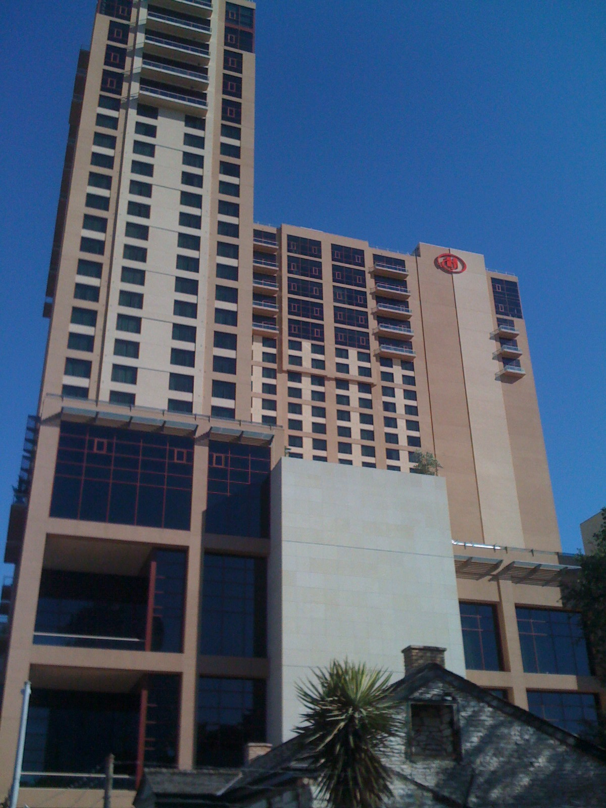 Hilton Austin